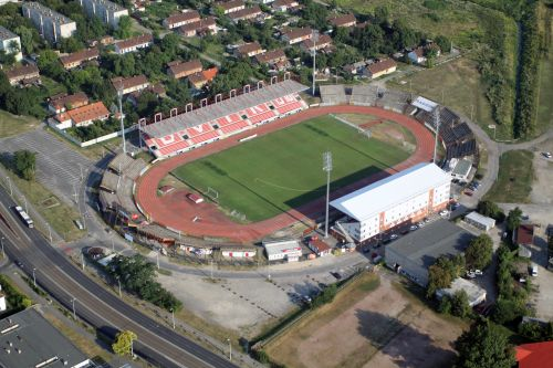 A régi stadion a 2010-es évek közepén